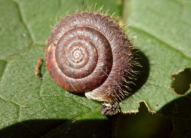 Haarschnecke, Trochulus spec., Wutachschlucht, Schwarzwald, Deutschland, Germany